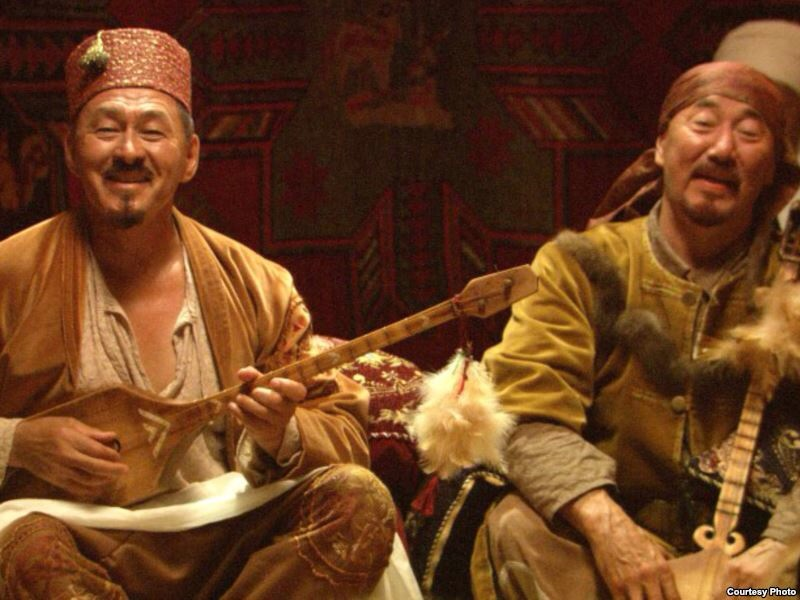 Сал мен сері.